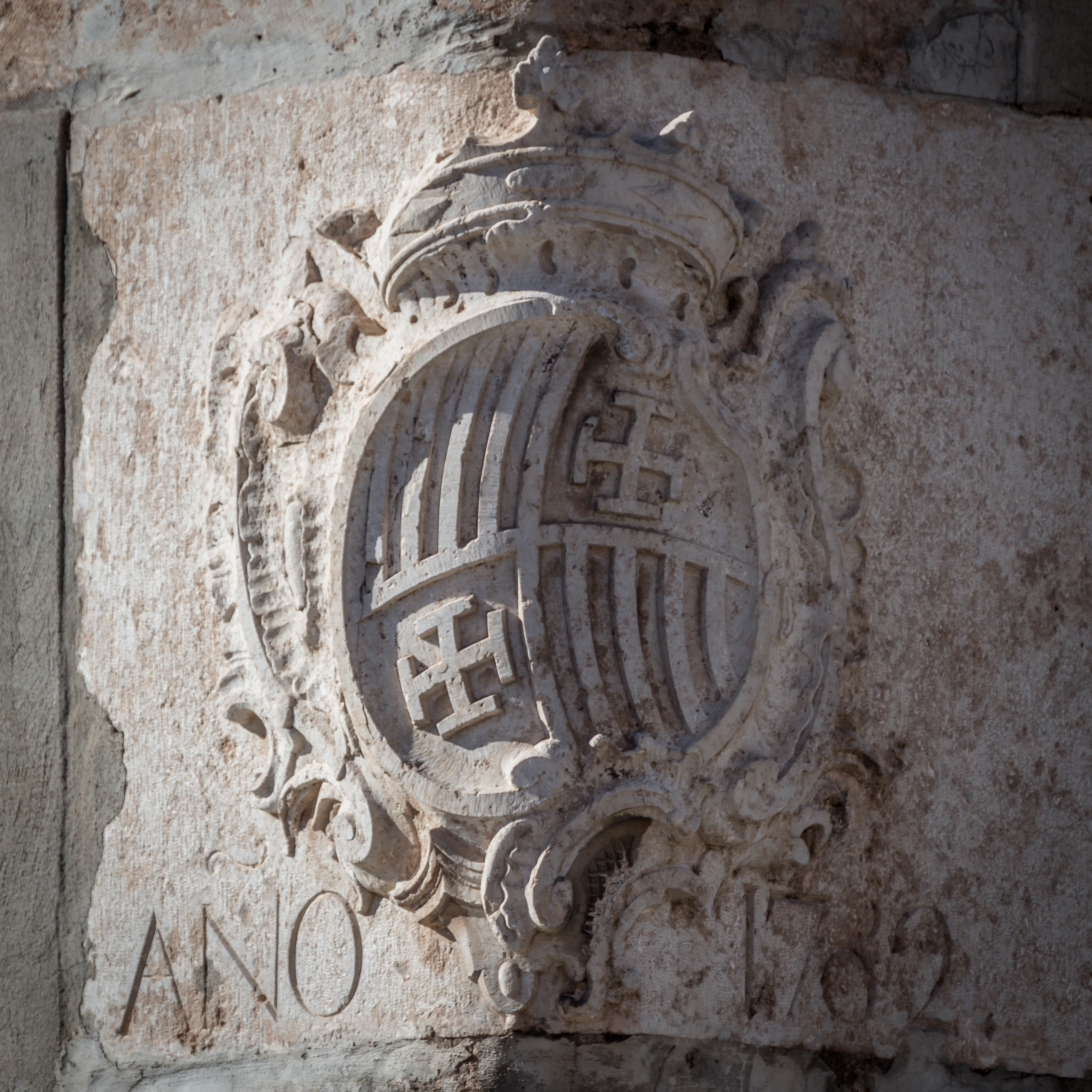 Escudo de Fernando de Aragón, Duque de Calabria, en la Casa Tota de Valencia 15.250-377.